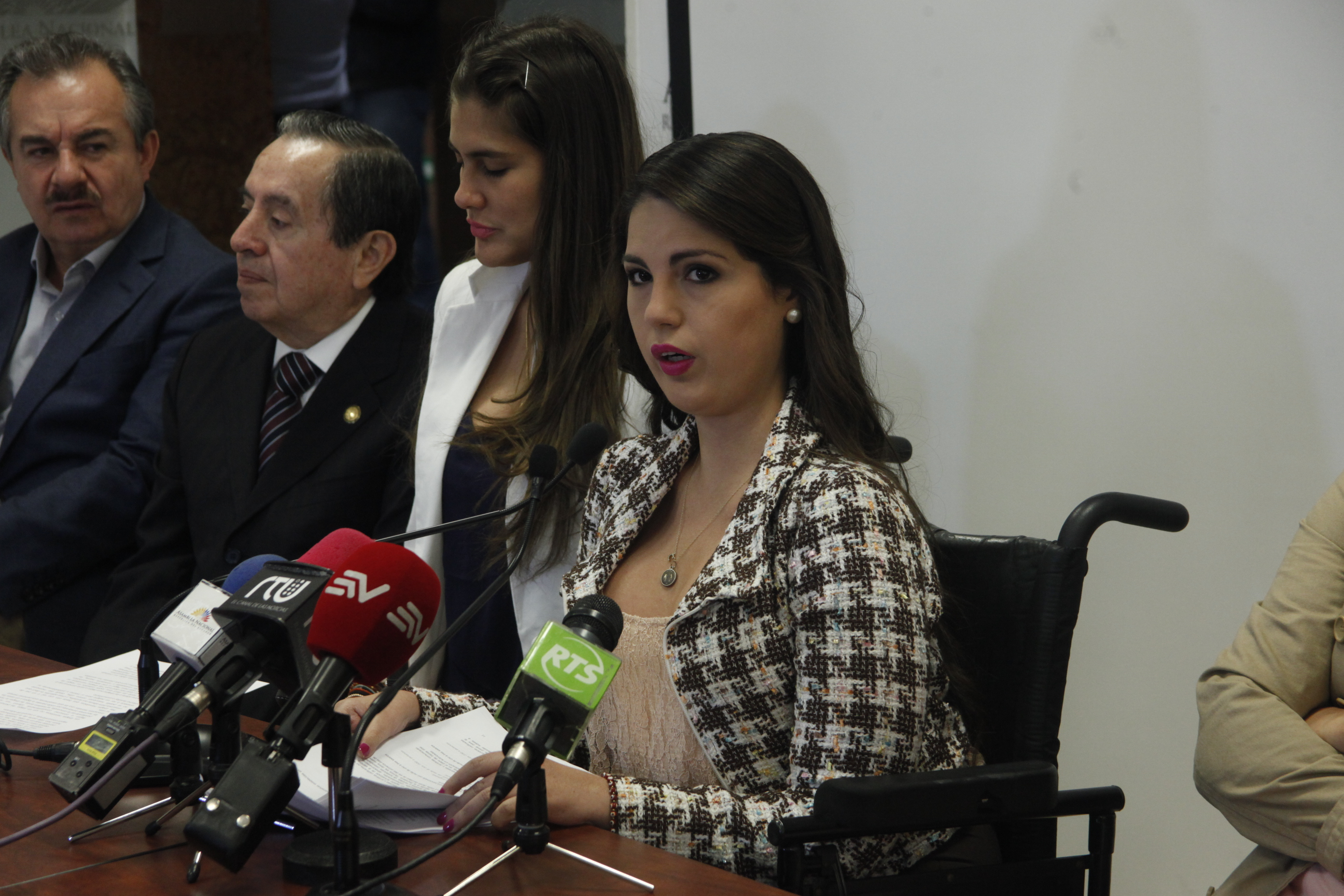 09 de abril de 2015 TEMA: Pronunciamiento sobre el Proyecto de Ley Orgánica y Prevención Integral de Drogas y Uso de Sustancias Catalogadas Sujetas a Fiscalización Fotografía: Hugo Ortiz / Asamblea Ecuador